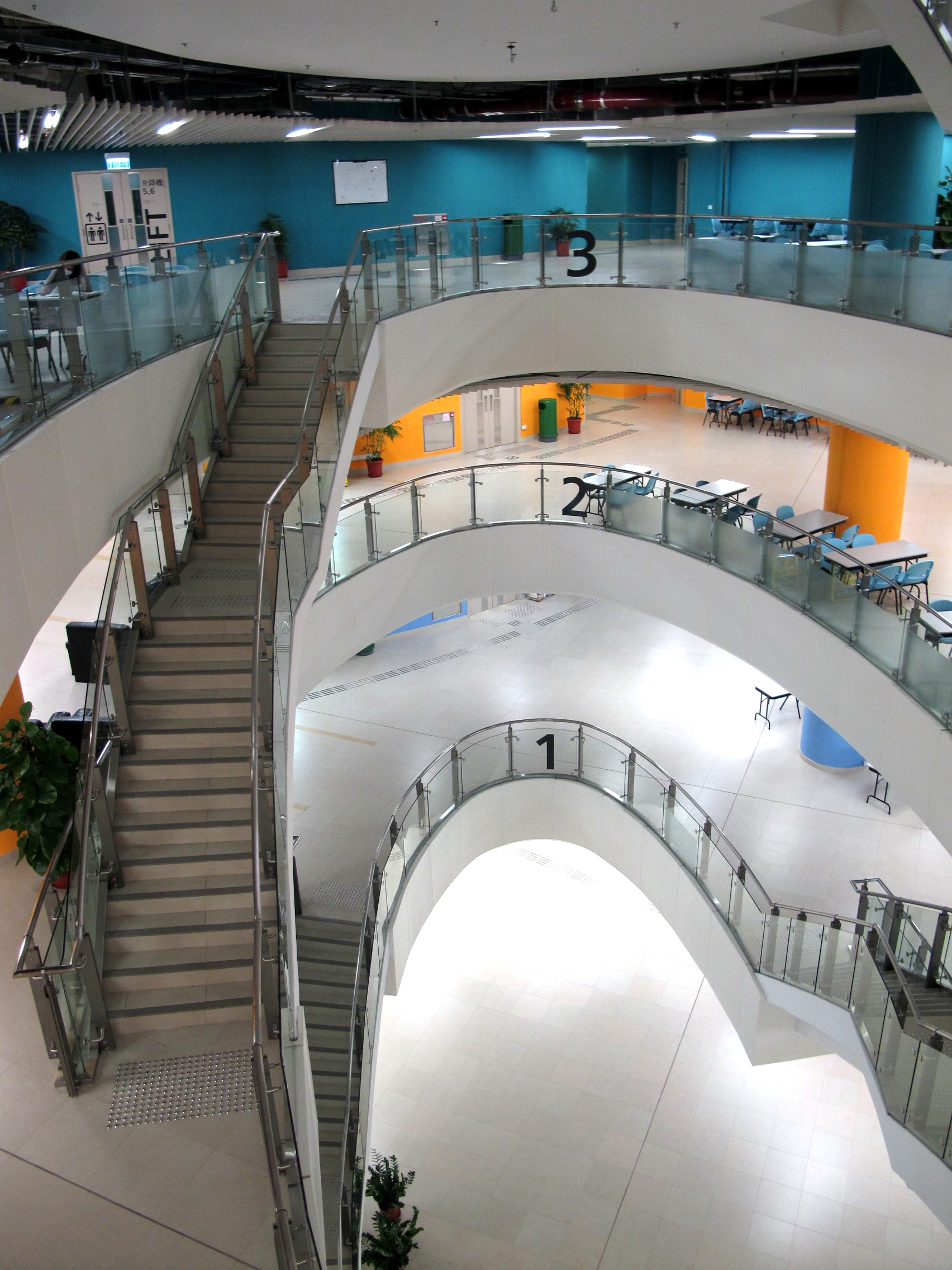 CityU AC2 Void